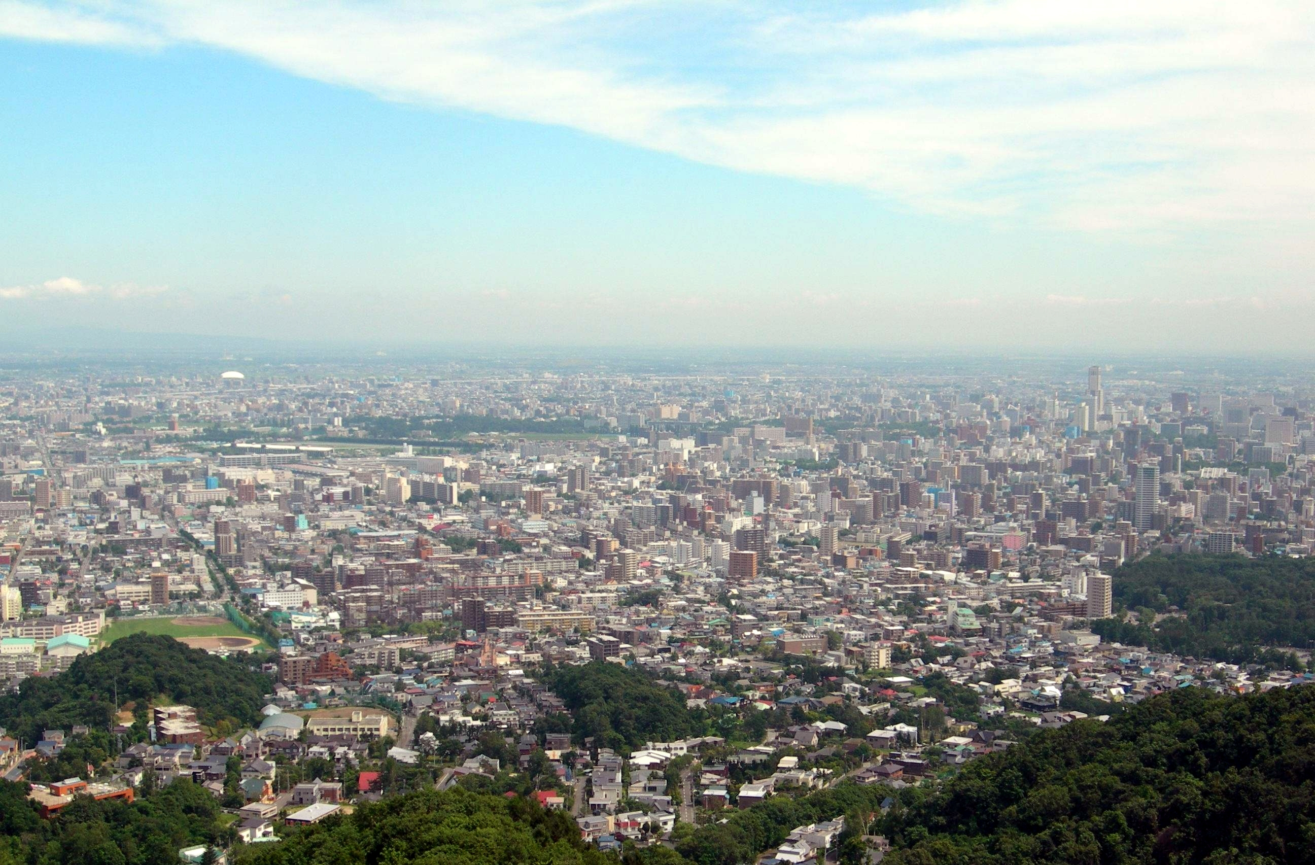 Blick auf Sapporo, Japan. Tonwertkorrigierte Version von File:BlickaufSapporo.JPG